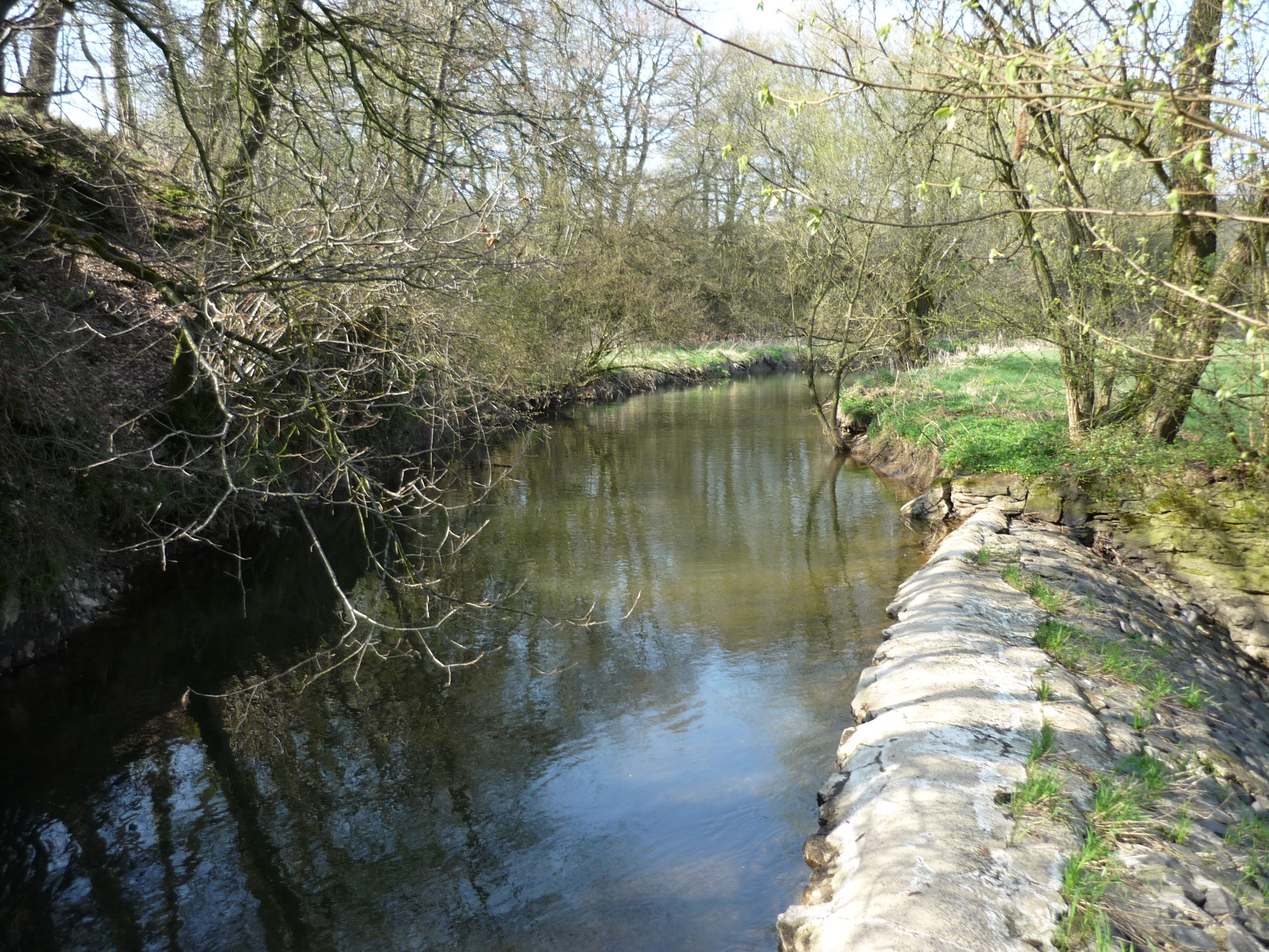 Wied: Stauwehr und Abzweigung des Mühlengrabens bei Widderstein , Westerwald